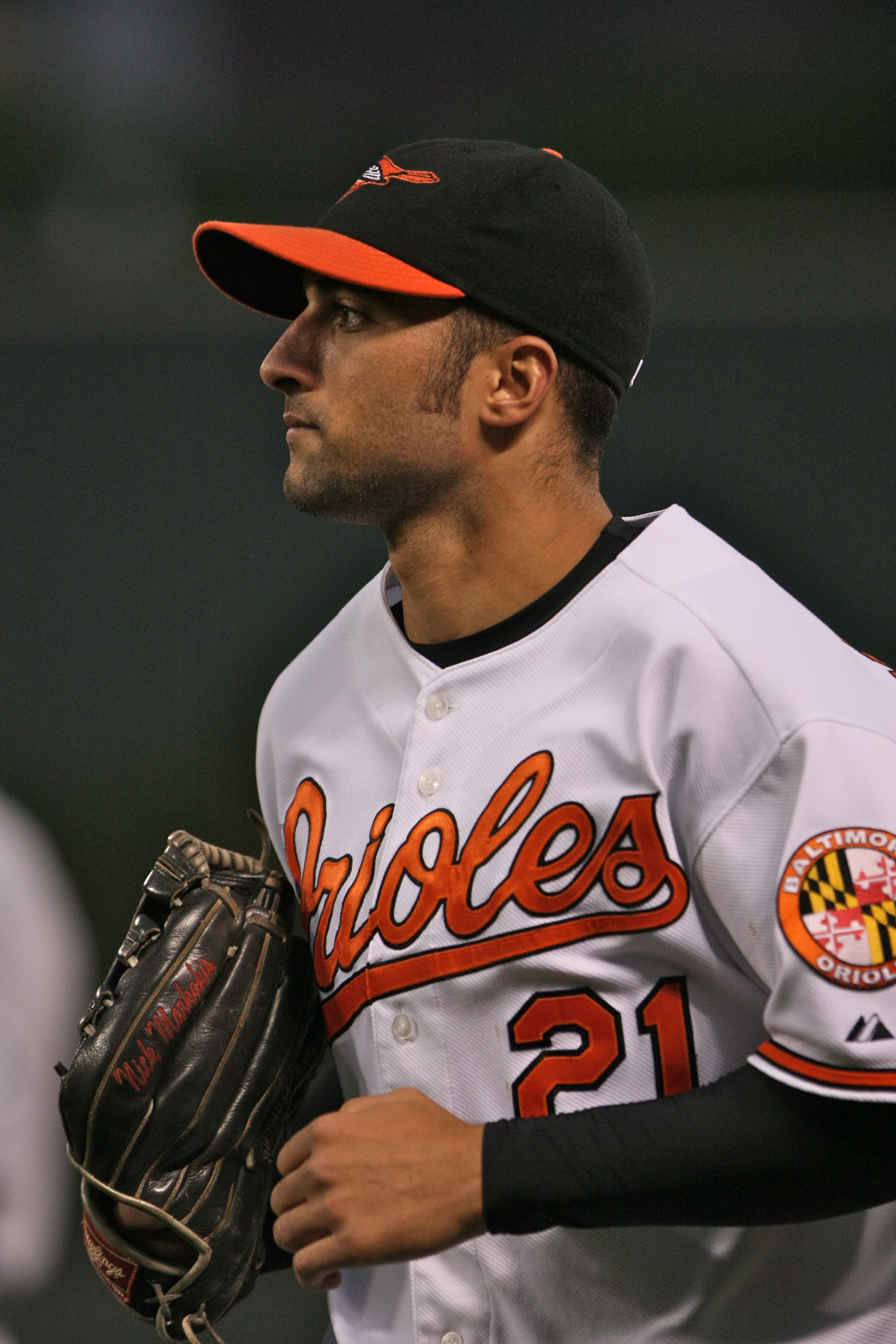 Nick Markakis